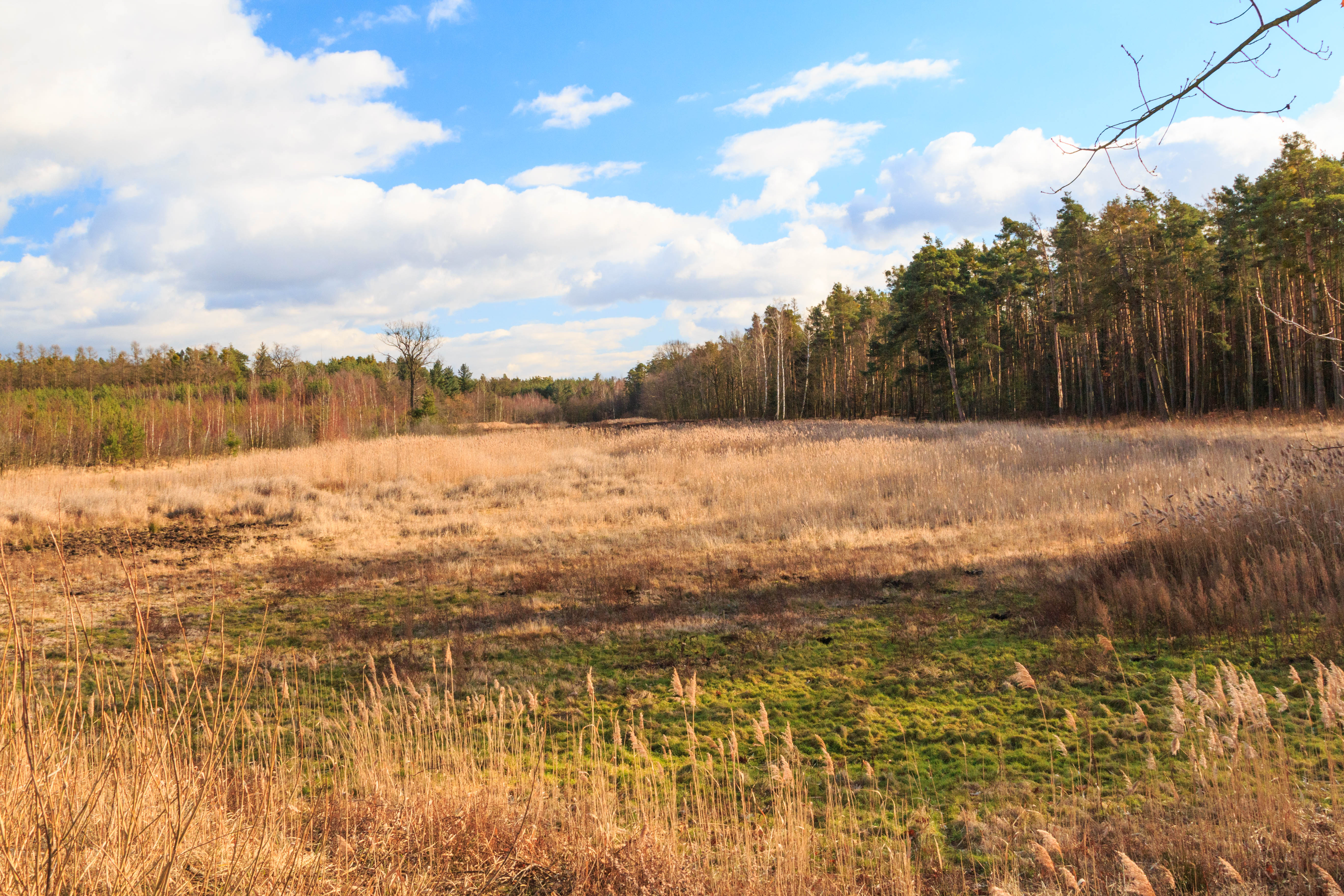 Bývalý rybník Dolní Flajšar u obce Štít